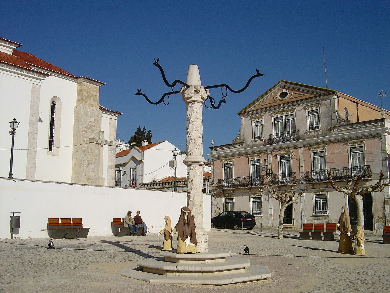 Natal de 2005